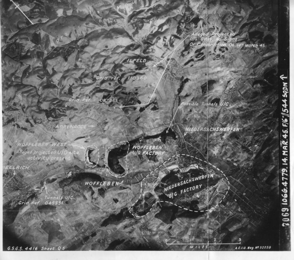 Luftaufnahme des Zorgetals zwischen Nordhausen und Ellrich mit den durch alliierte Luftauswertung markierten Untertageanlagen bei Niedersachswerfen und Woffleben. Das Foto stammt aus den Military Intelligence Photographic Interpretation Reports (MIPI Reports) des Hauptquartiers der U.S. Army Air Forces. Diese Bestände befinden sich in den Beständen der National Archives, Washington (Record Group 341).